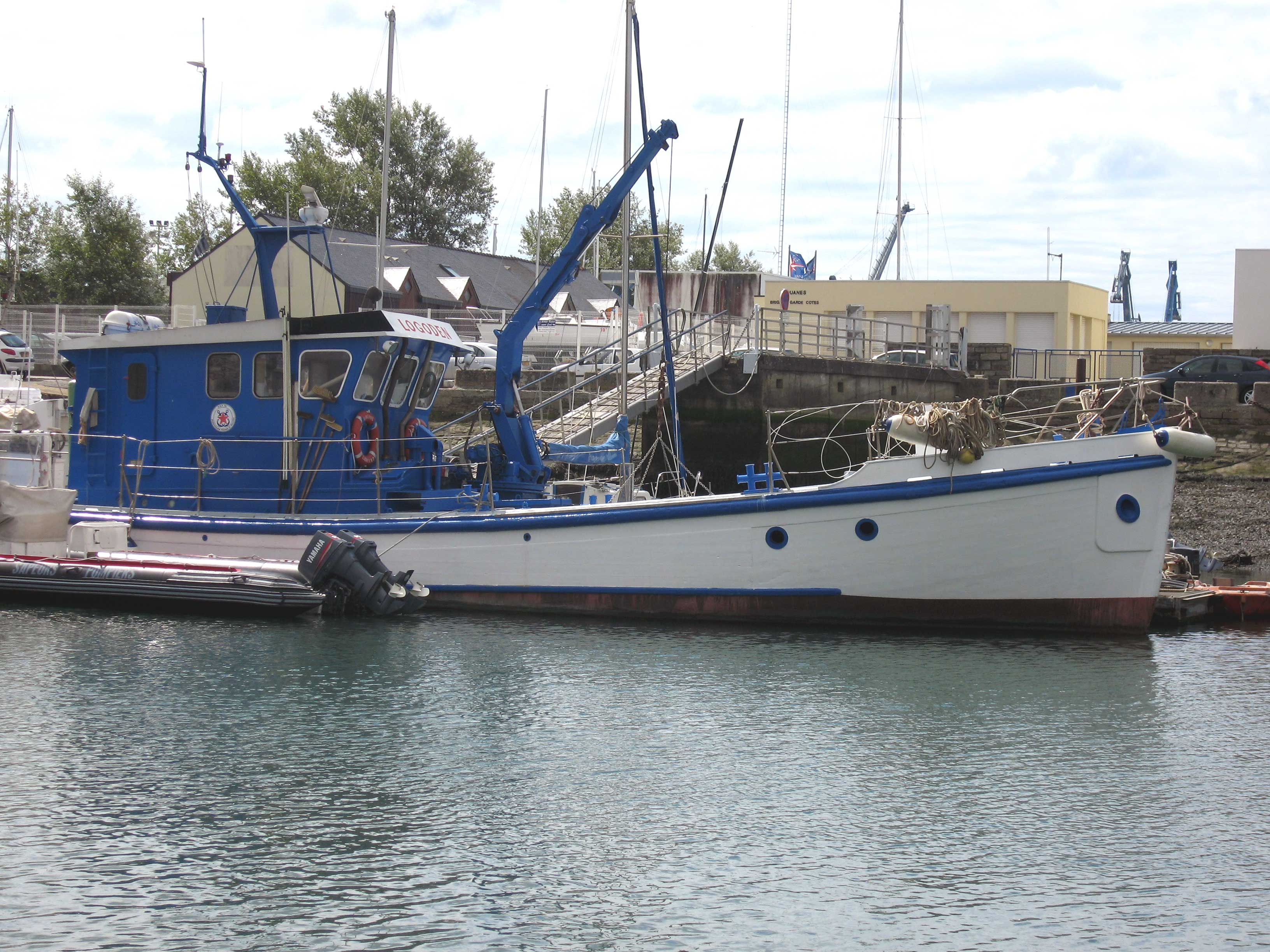 Description : Le Logoden, batiment de travaux des Phares et Balises Place : Lorient, Bretagne, France Date : 2006 Auteur : Pline